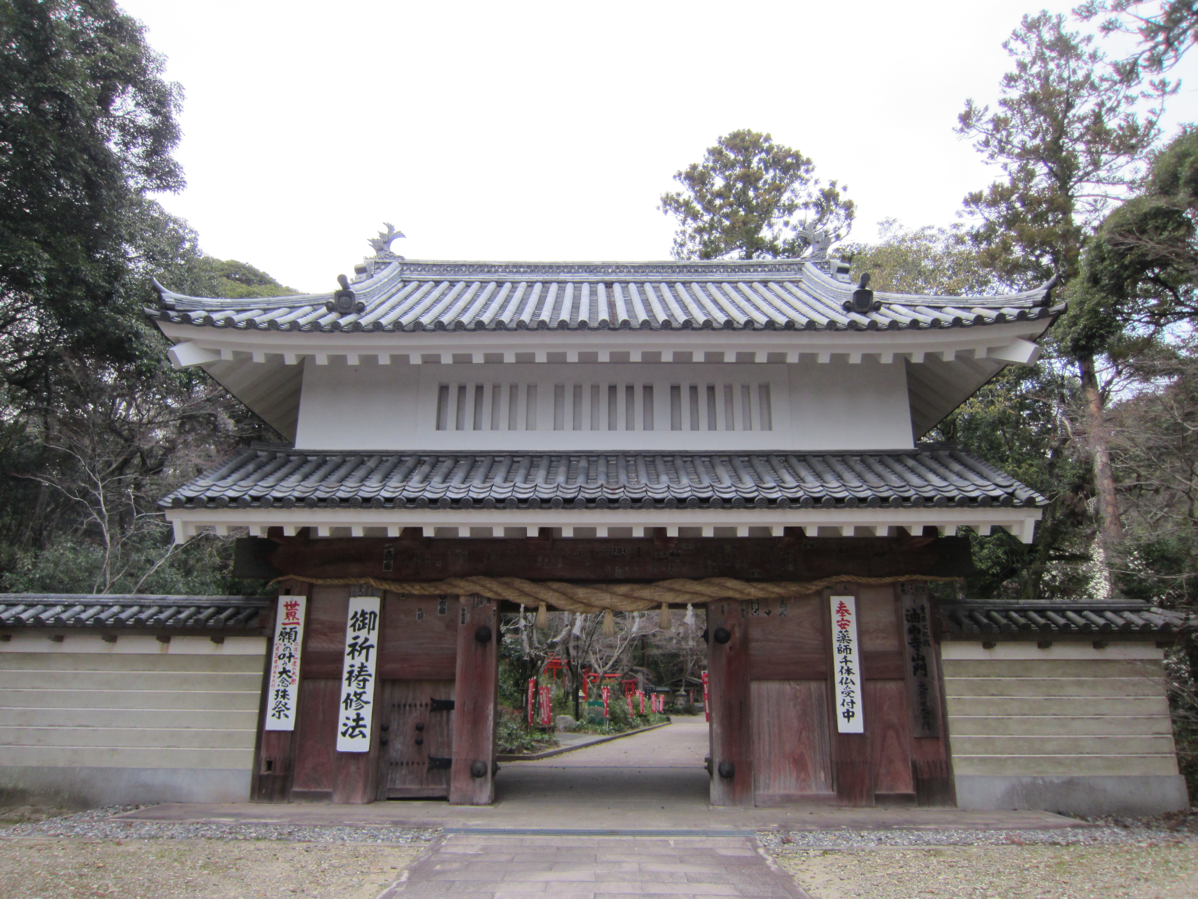 Muramatsu, Fukuroi, Shizuoka Prefecture 437-0011, Japan